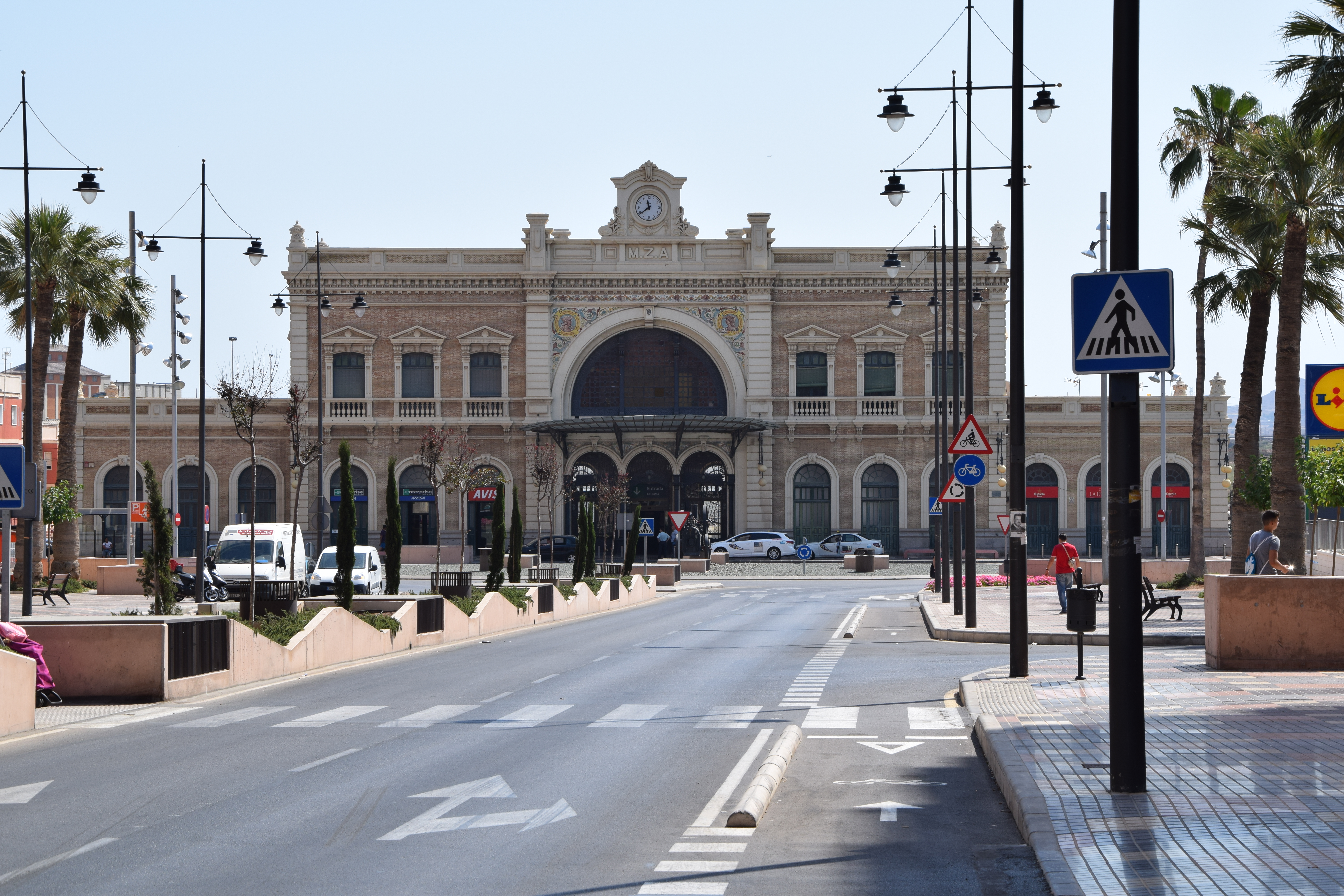 Estacion Tren MZA Cartagena